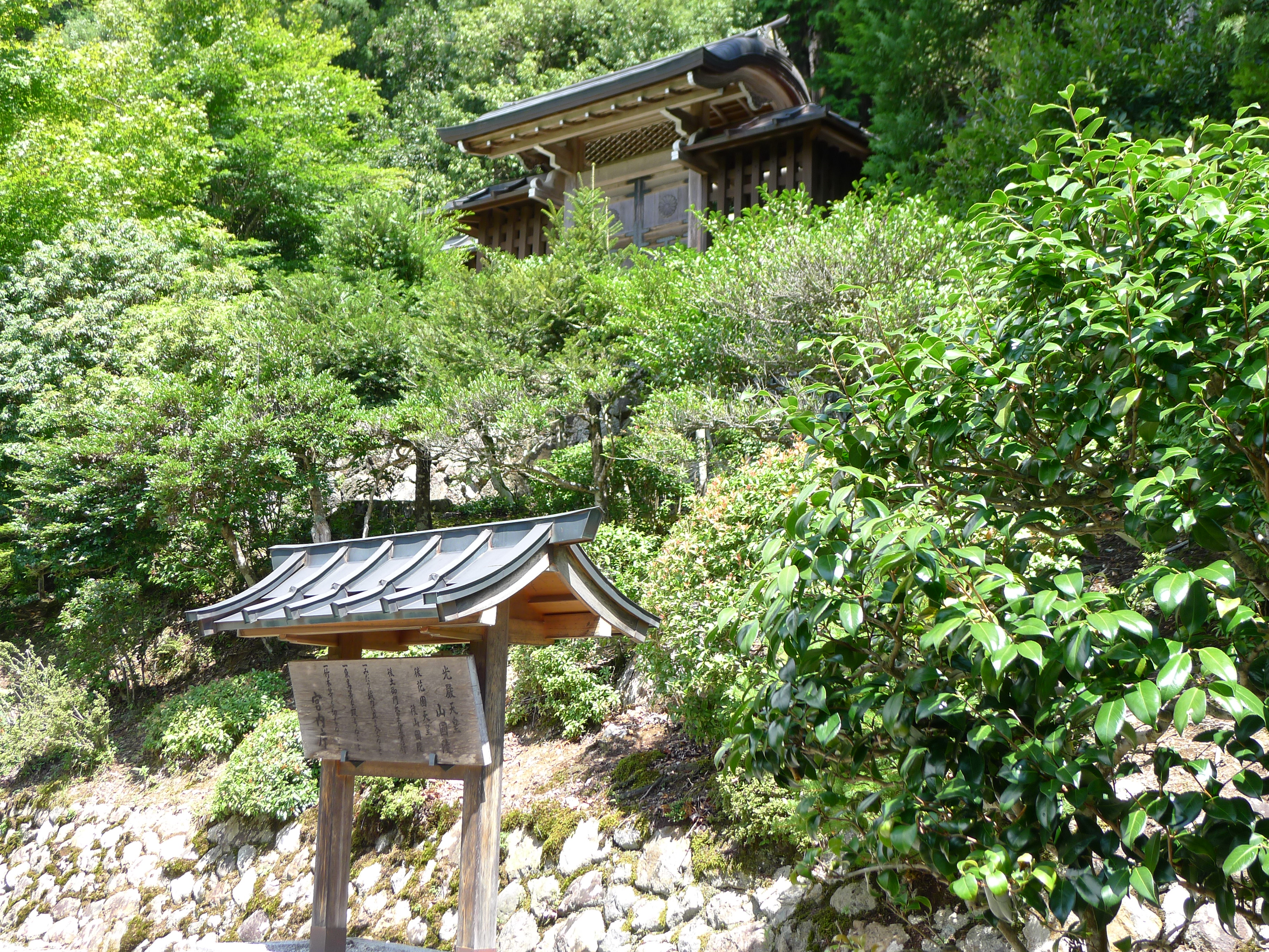 常照皇寺の裏手にある光厳天皇の墓地・山国御陵